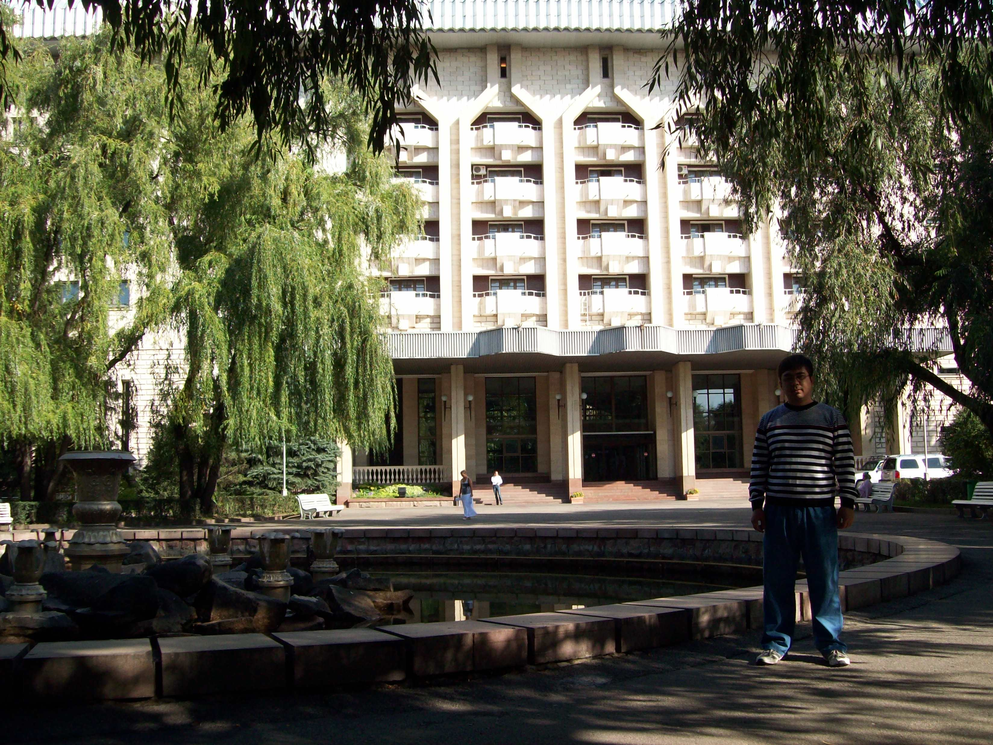 Лечебно-оздоровительный комплекс «Алатау» расположен в пригороде южной столицы Республики Казахстан - города Алматы, в живописной местности на высоте 800 м над уровнем моря.